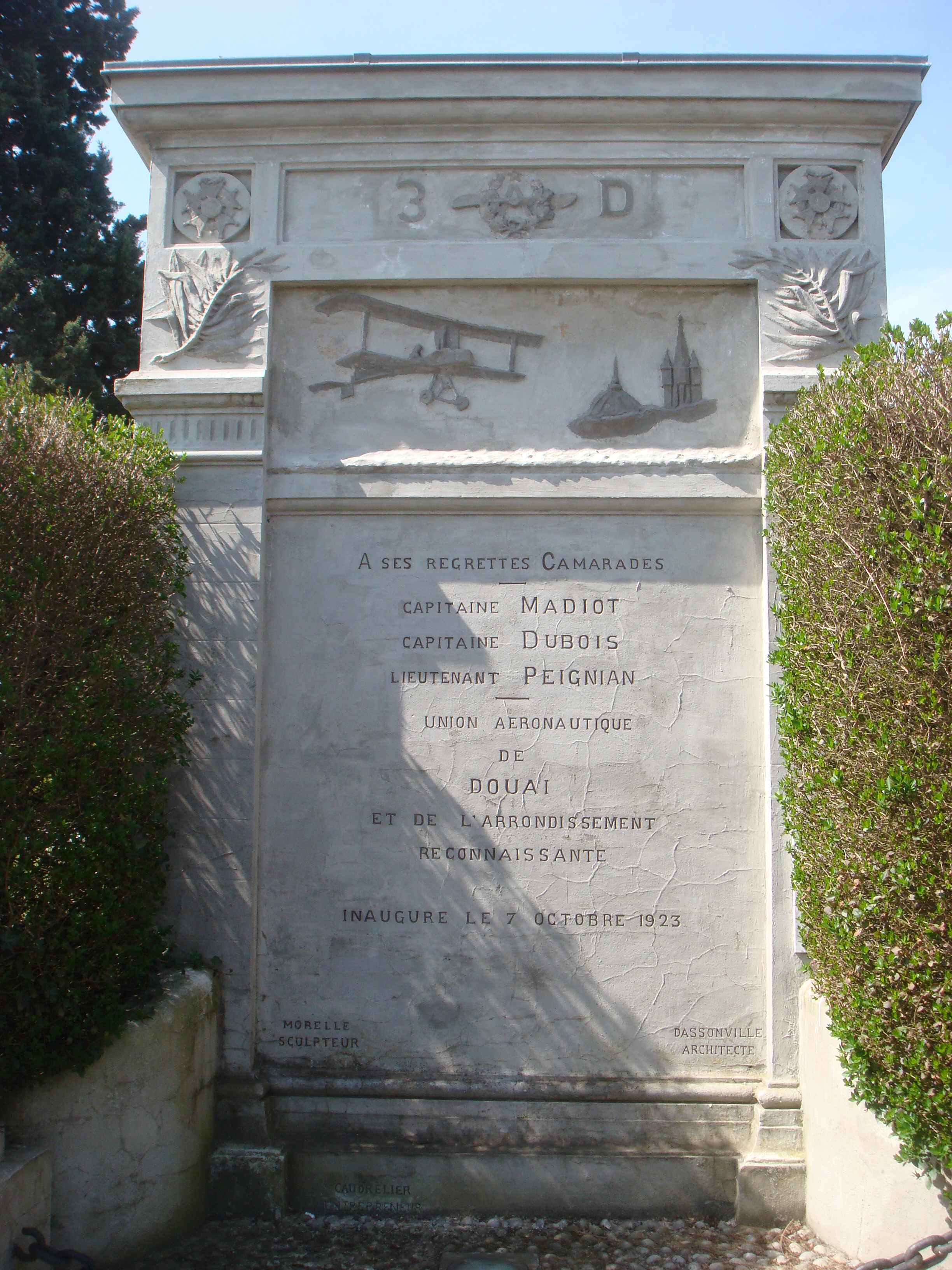 Début de l'Aviation